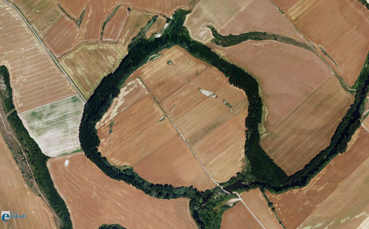 Leziñaka Oka herriko meandroa (Araba)